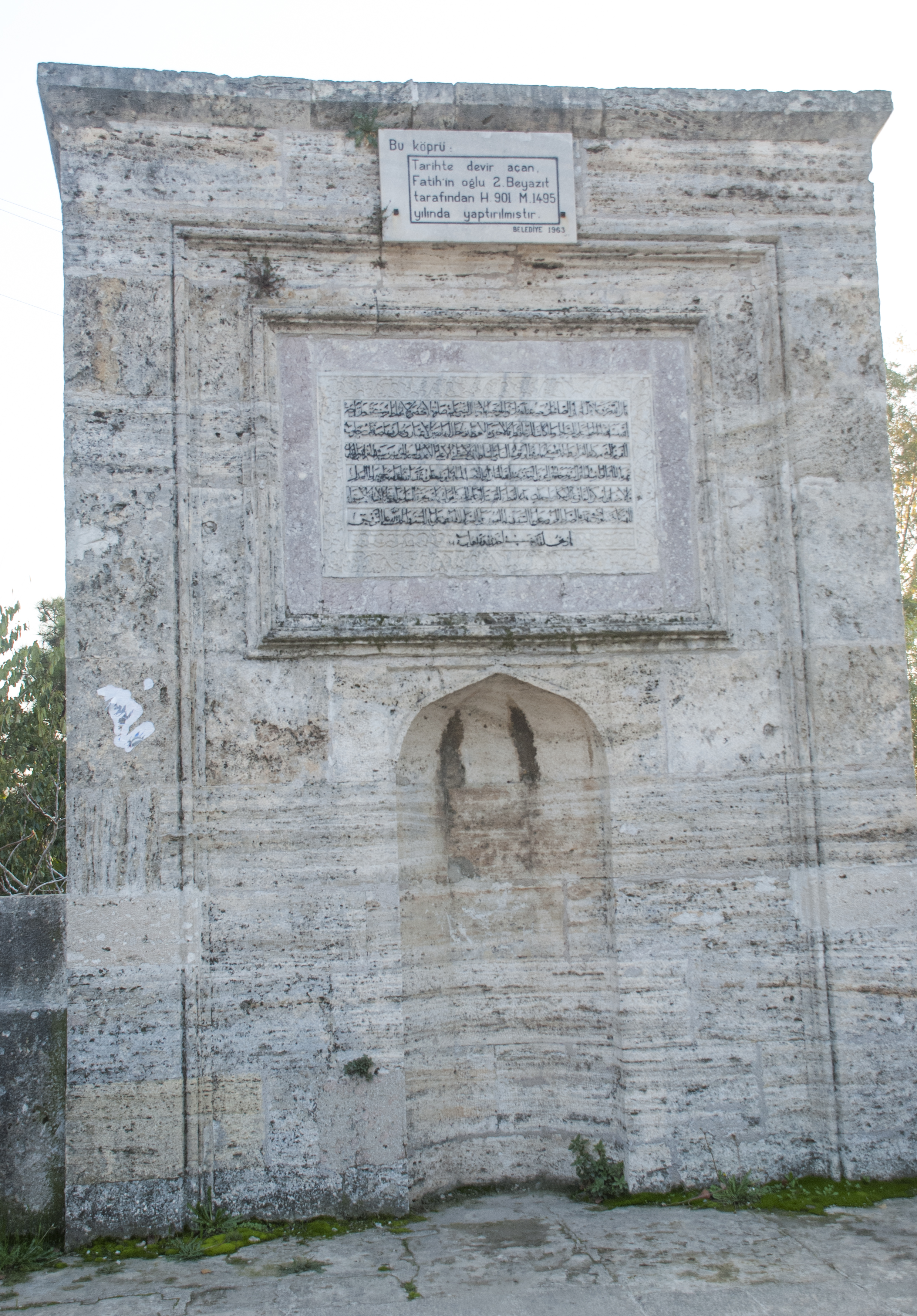 Sakarya Nehri üzerine II. Beyazit'in yaptırdığı köprünün kitabesi.